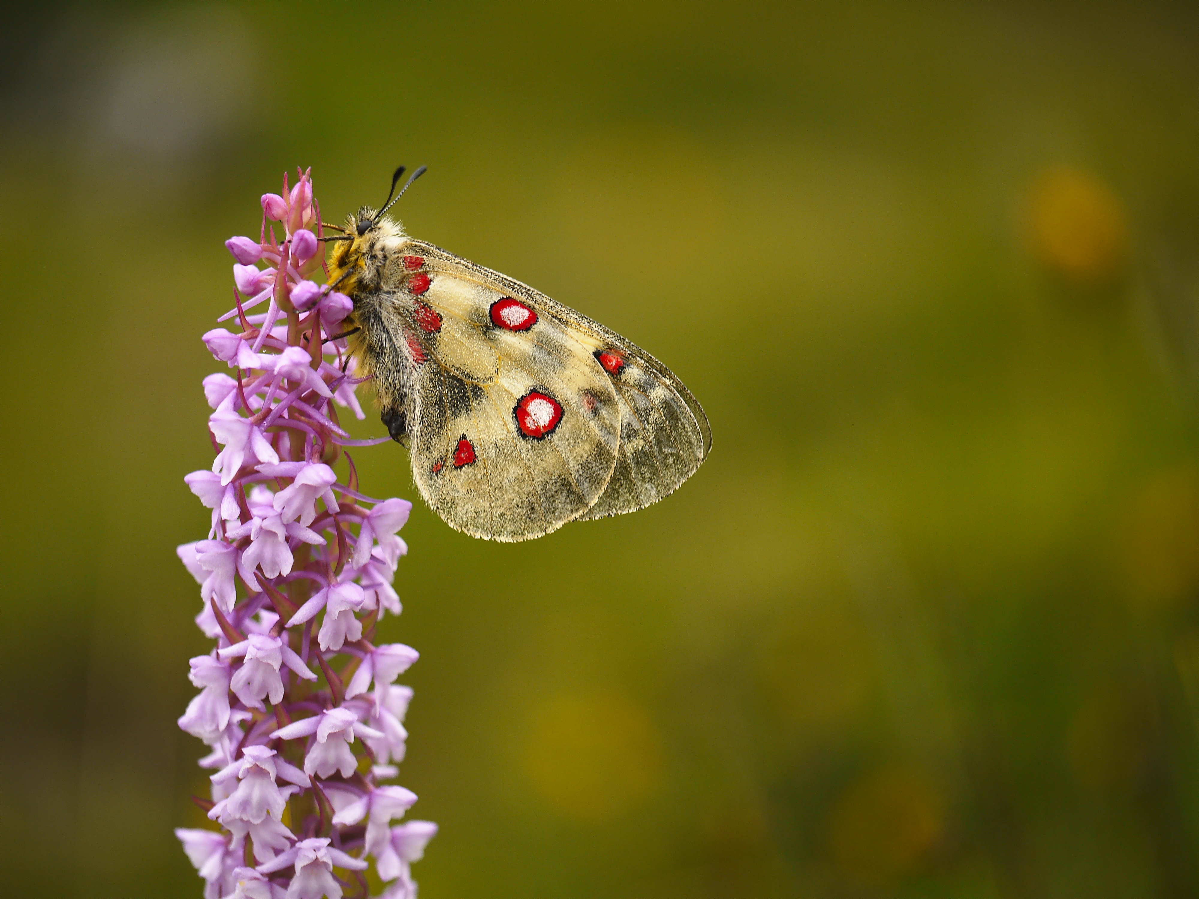 Hochalpen-Apollo (Parnassius phoebus) - Nationalpark Hohe Tauern - Kärnten, Österreich - Panasonic GF1 + Leica DG Macro-Elmarit 45mm F2.8 ASPH OIS